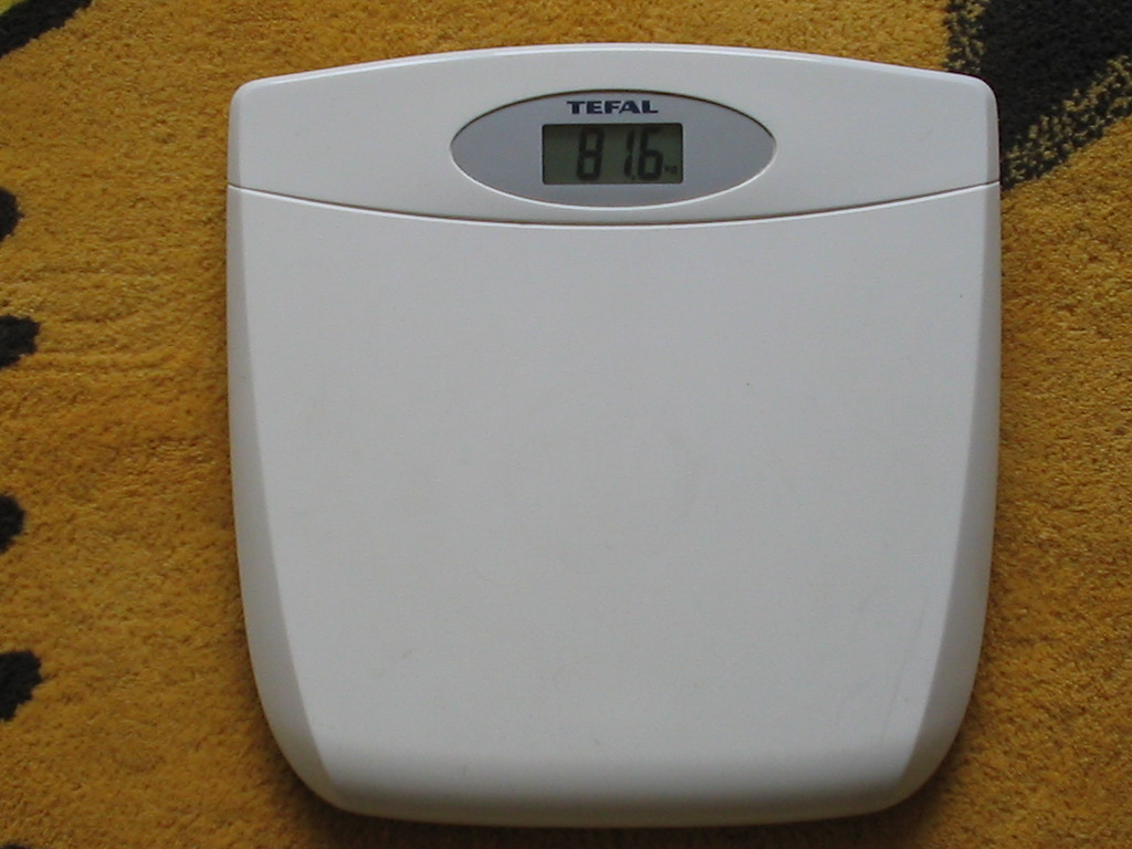 Tefal personenweegschaal